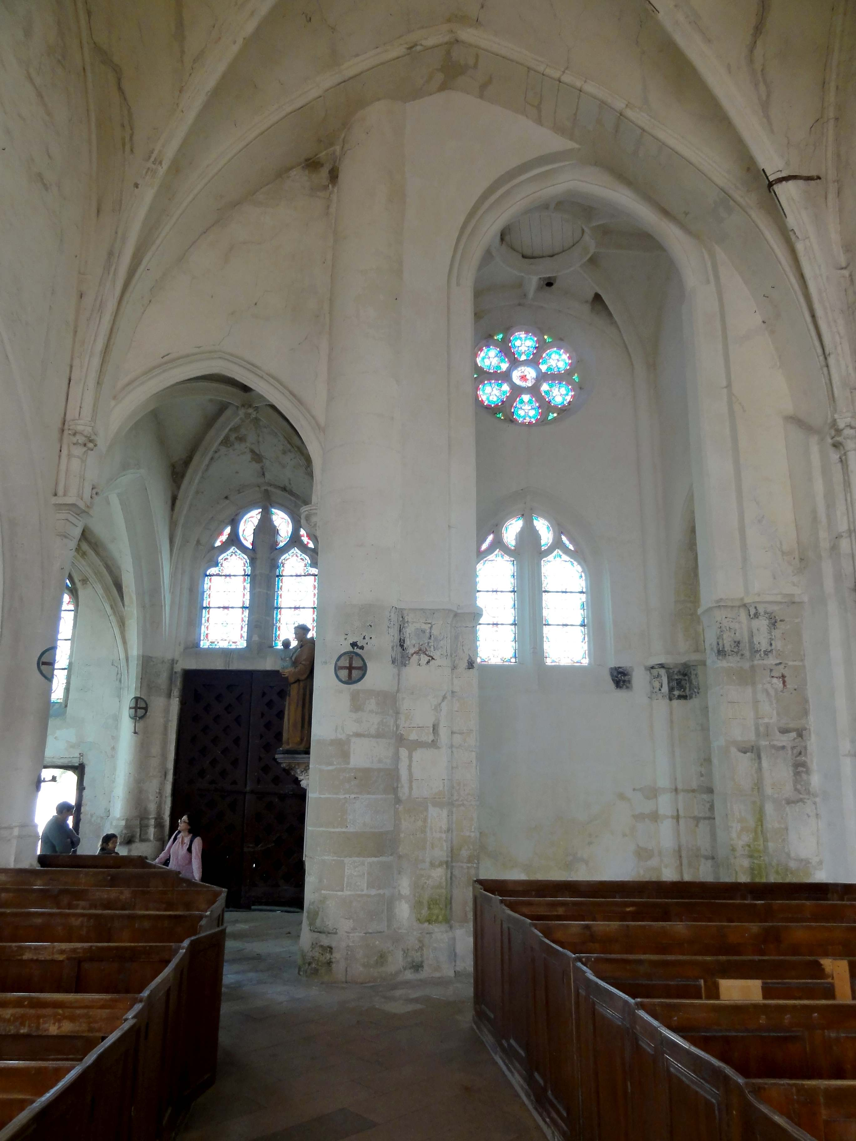 Intérieur de l'église (voir titre).